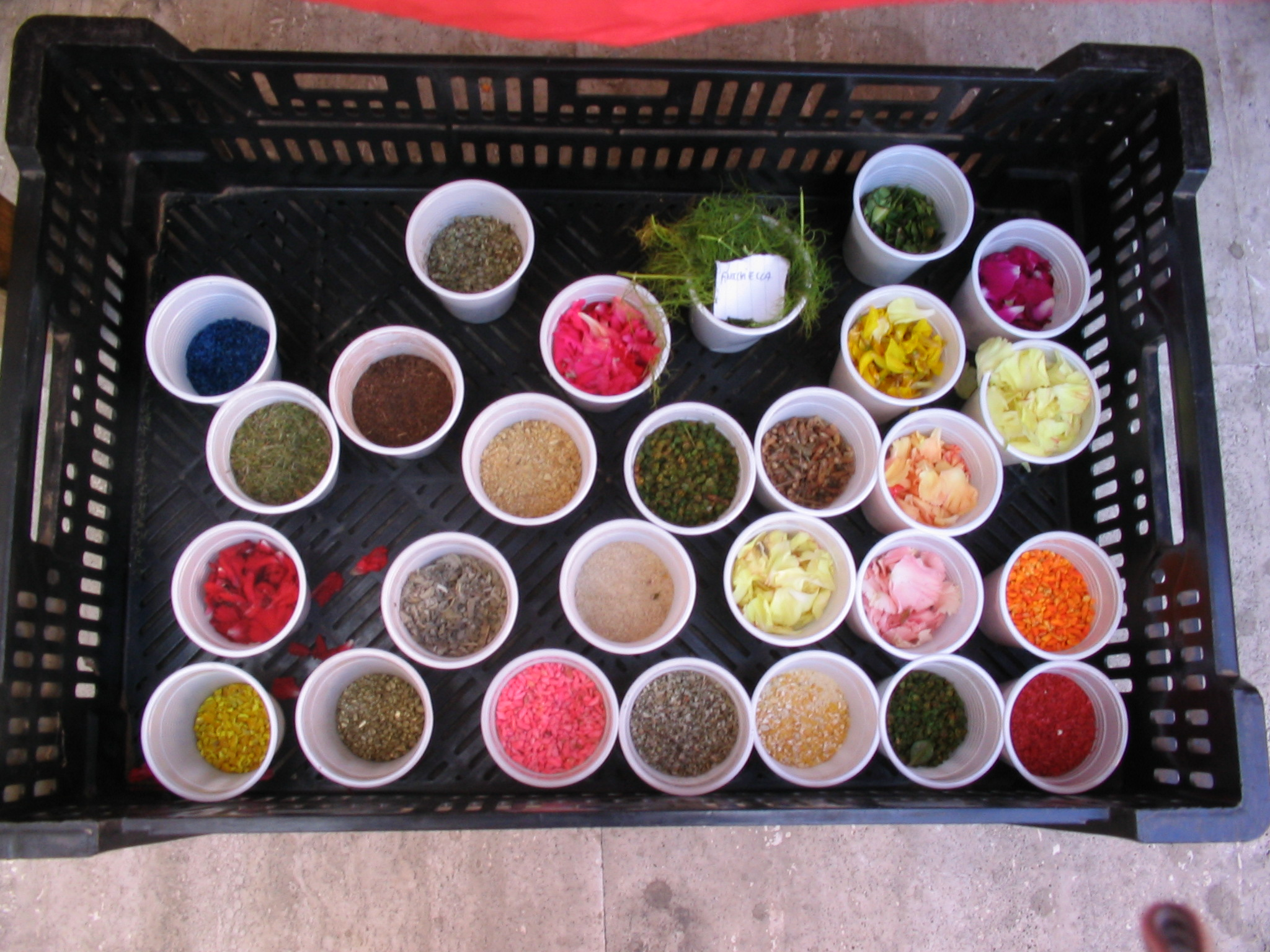 Genzano di Roma, Infiorata, Colori utilizzati